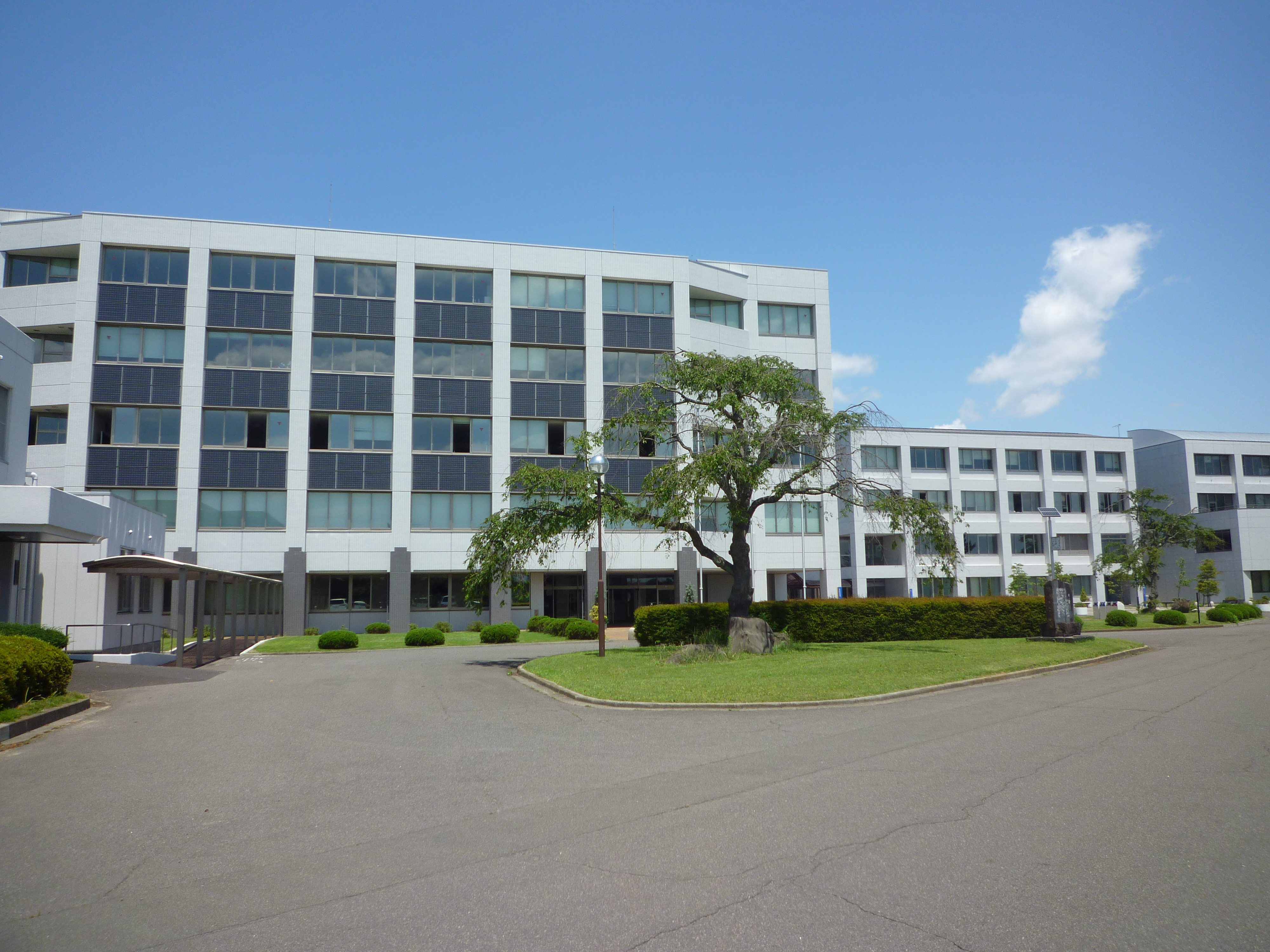 校舎